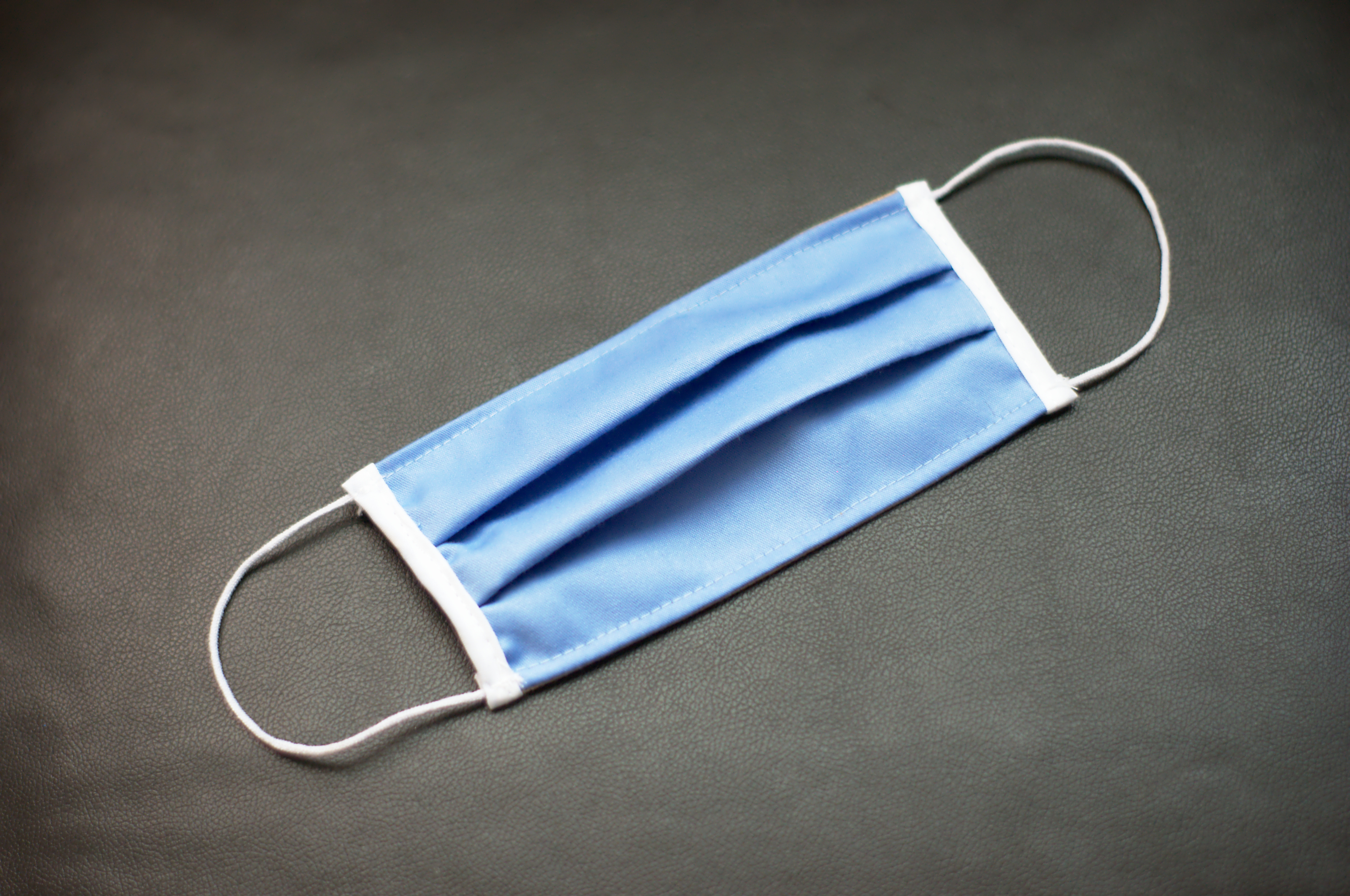 CC BY SA-User:Dyolf77